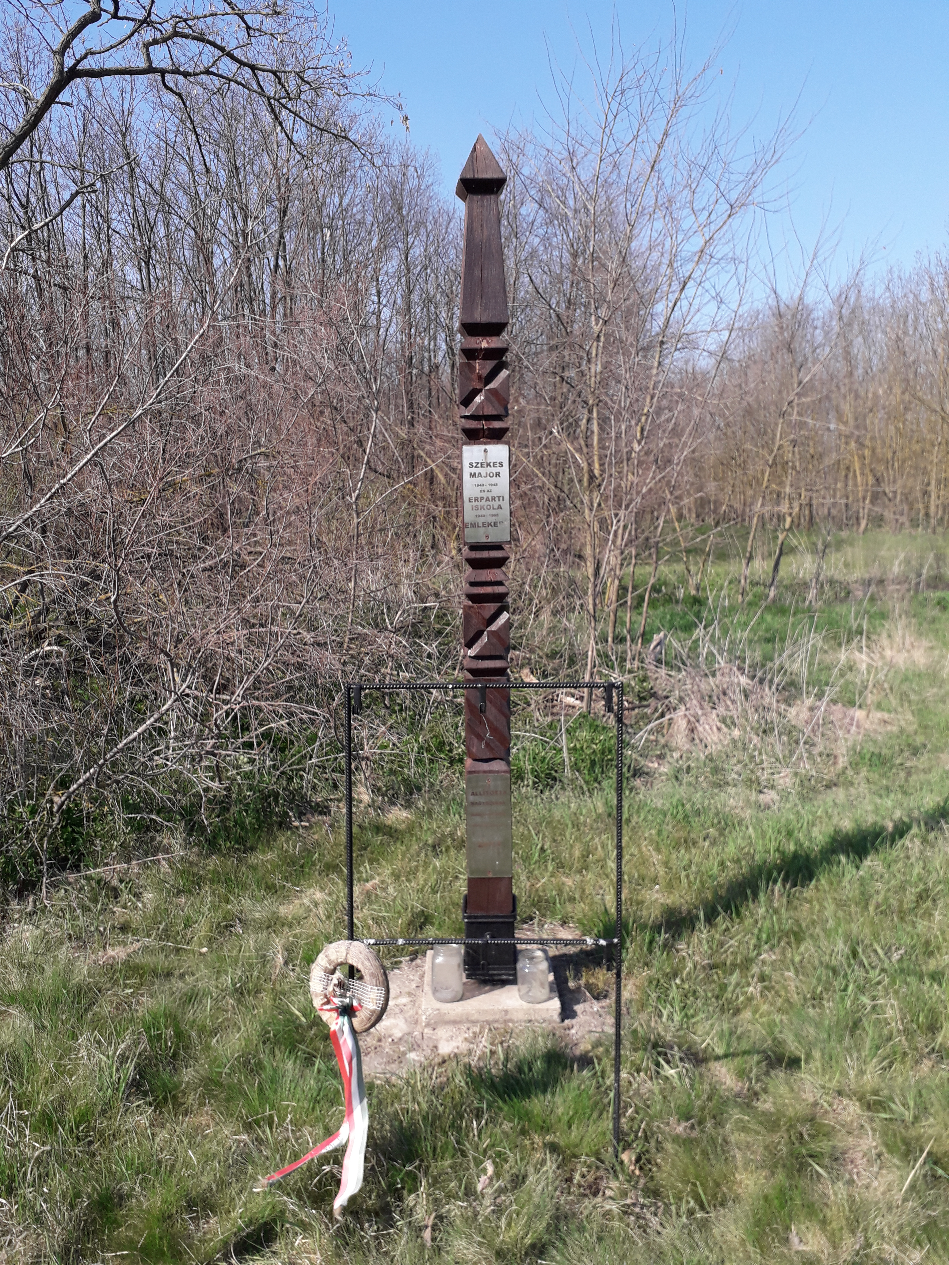 Érparti Iskola emlékműve